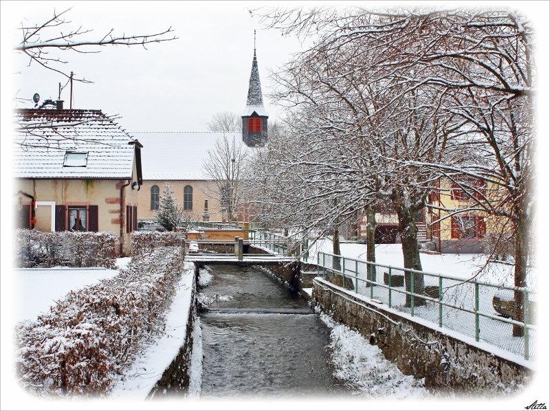 Le village de Bassemberg sous la neige.